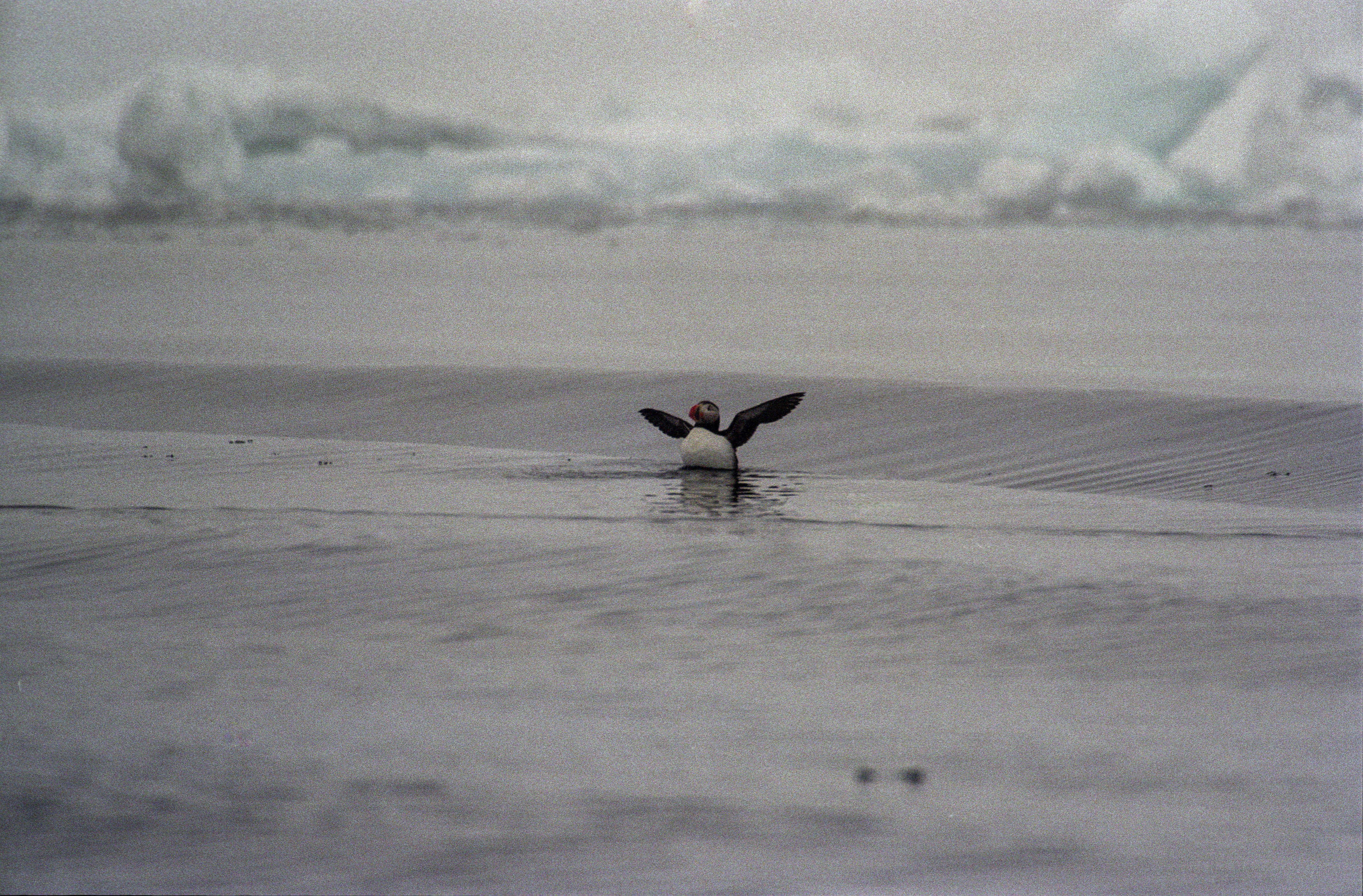 spitsbergen, Atlantic Puffin